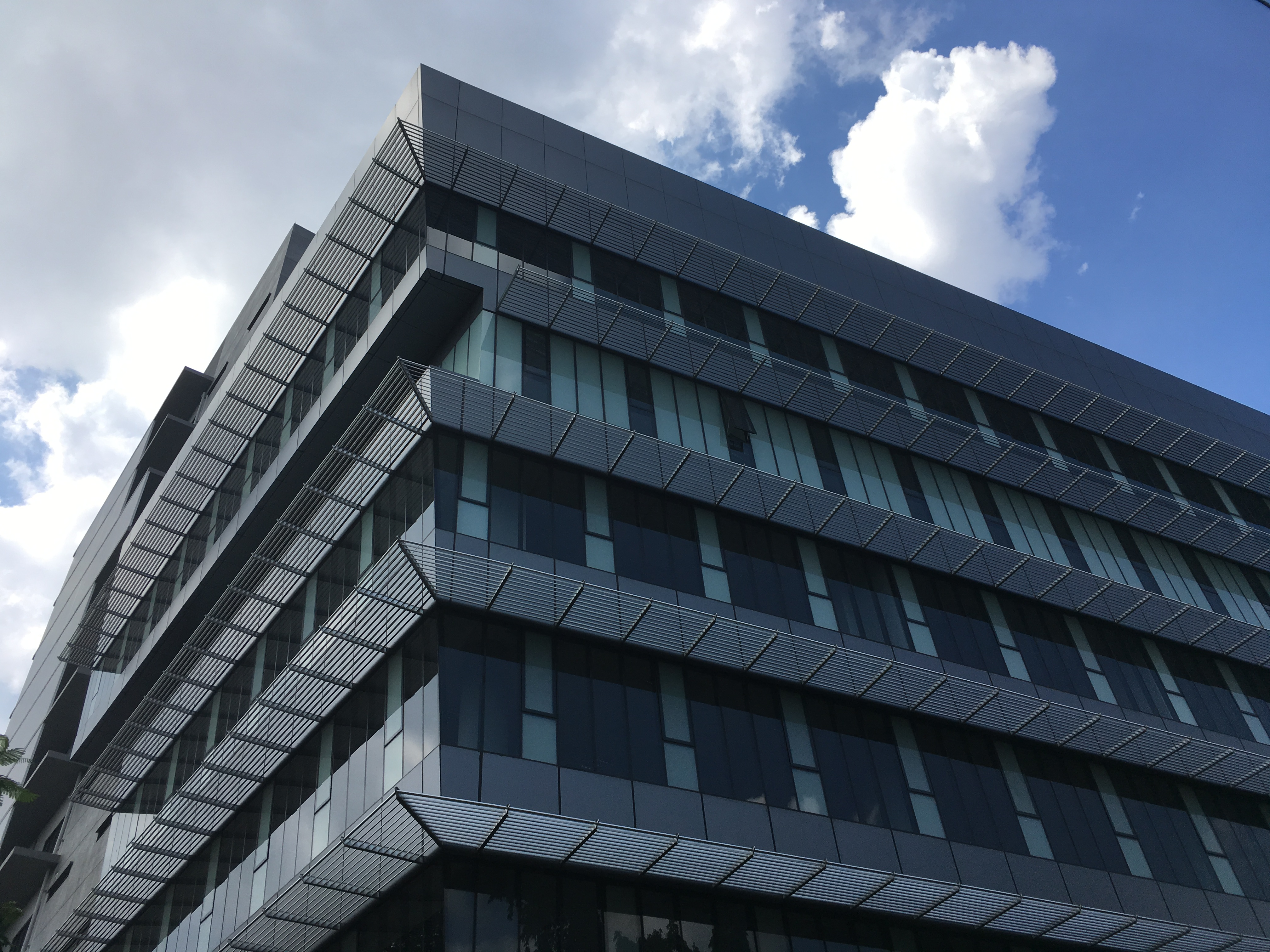 อาคารศูนย์วิจัยวิทยาศาสตร์จุฬาภรณ์ 60 พรรษา